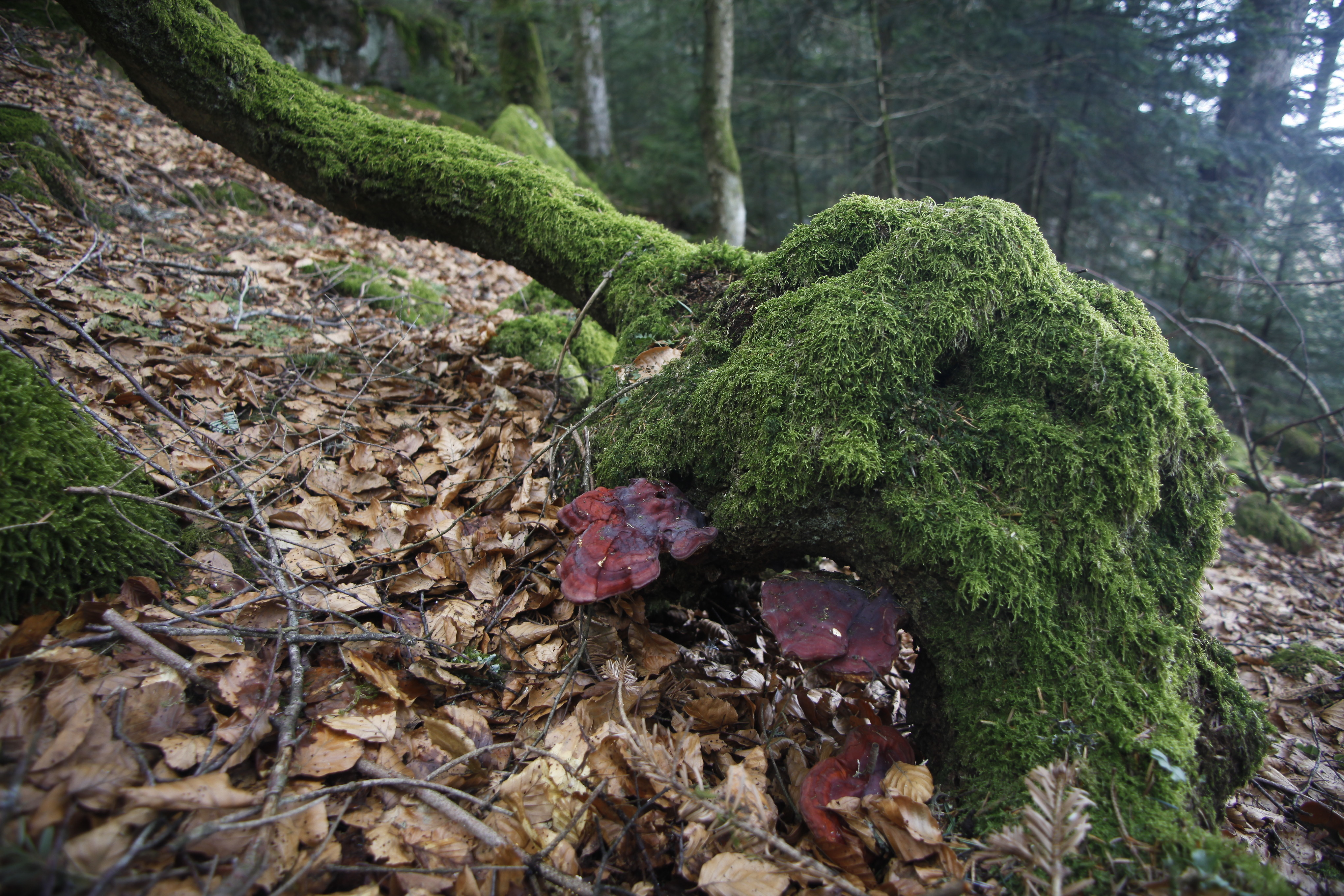 Une souche avec des champignons à la Tourbière des Charmes